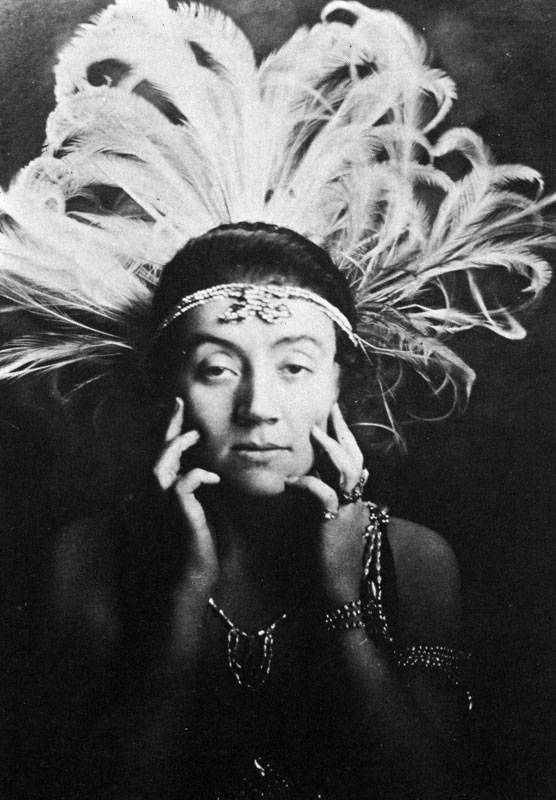 Naima Wifstrand som Czardasfurstinnan 1916